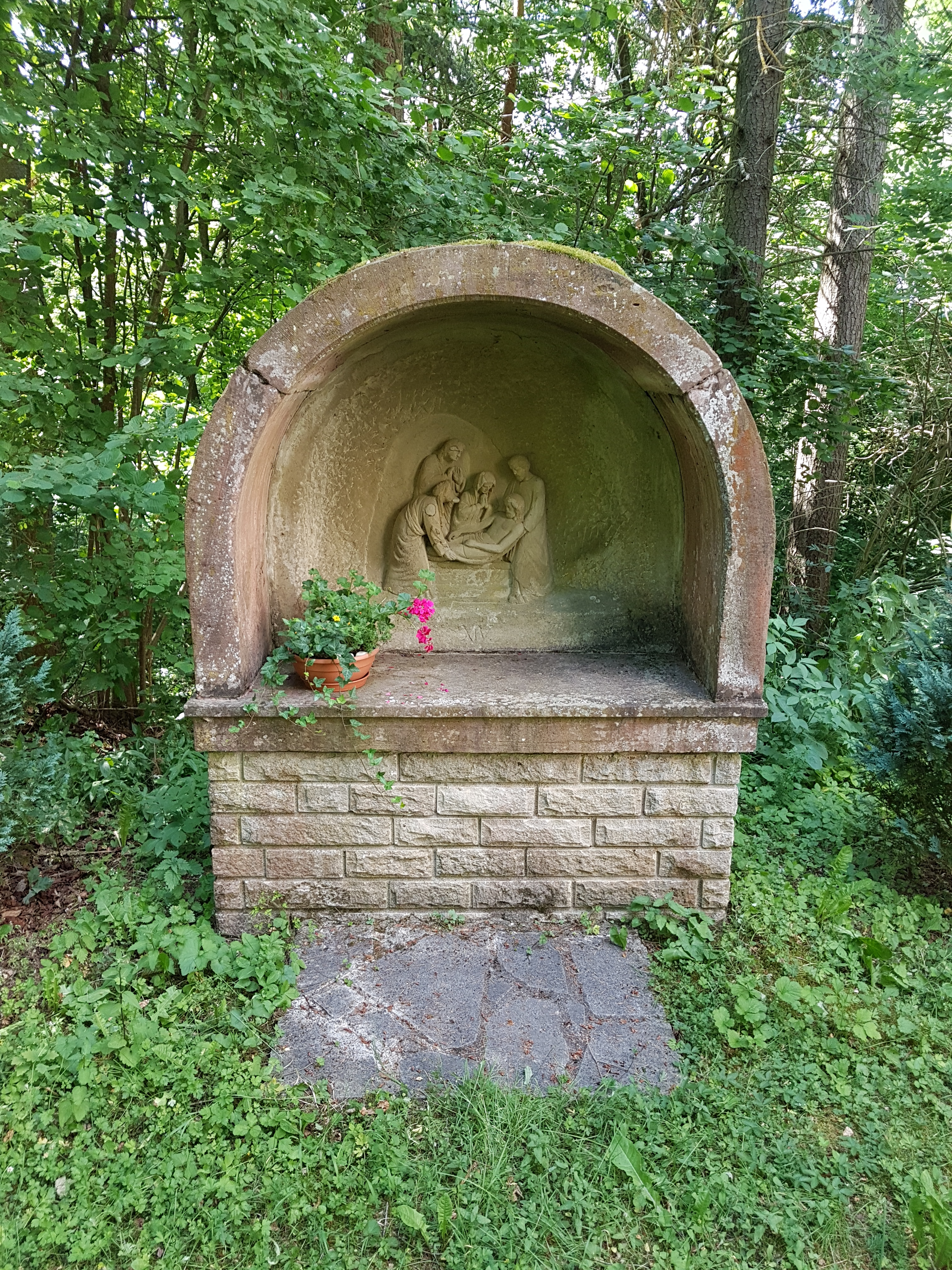 Kreuzweg zur Dittwarer Kreuzkapelle am Kreuzhölzle Bilder hochkant